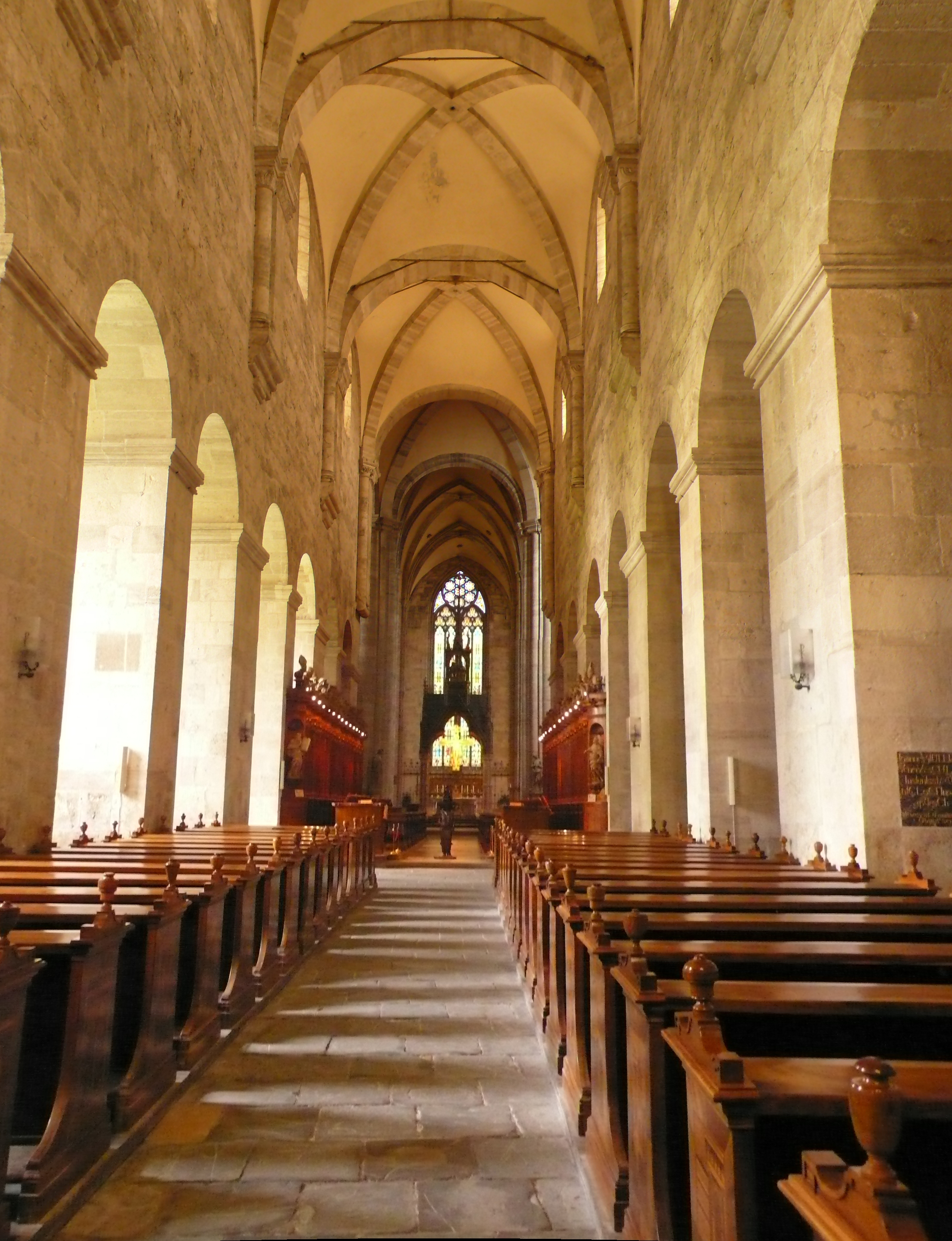 Stift Heiligenkreuz, Niederösterreich; Stiftskirche, Längsschiff romanisch (Panorama senkrecht)